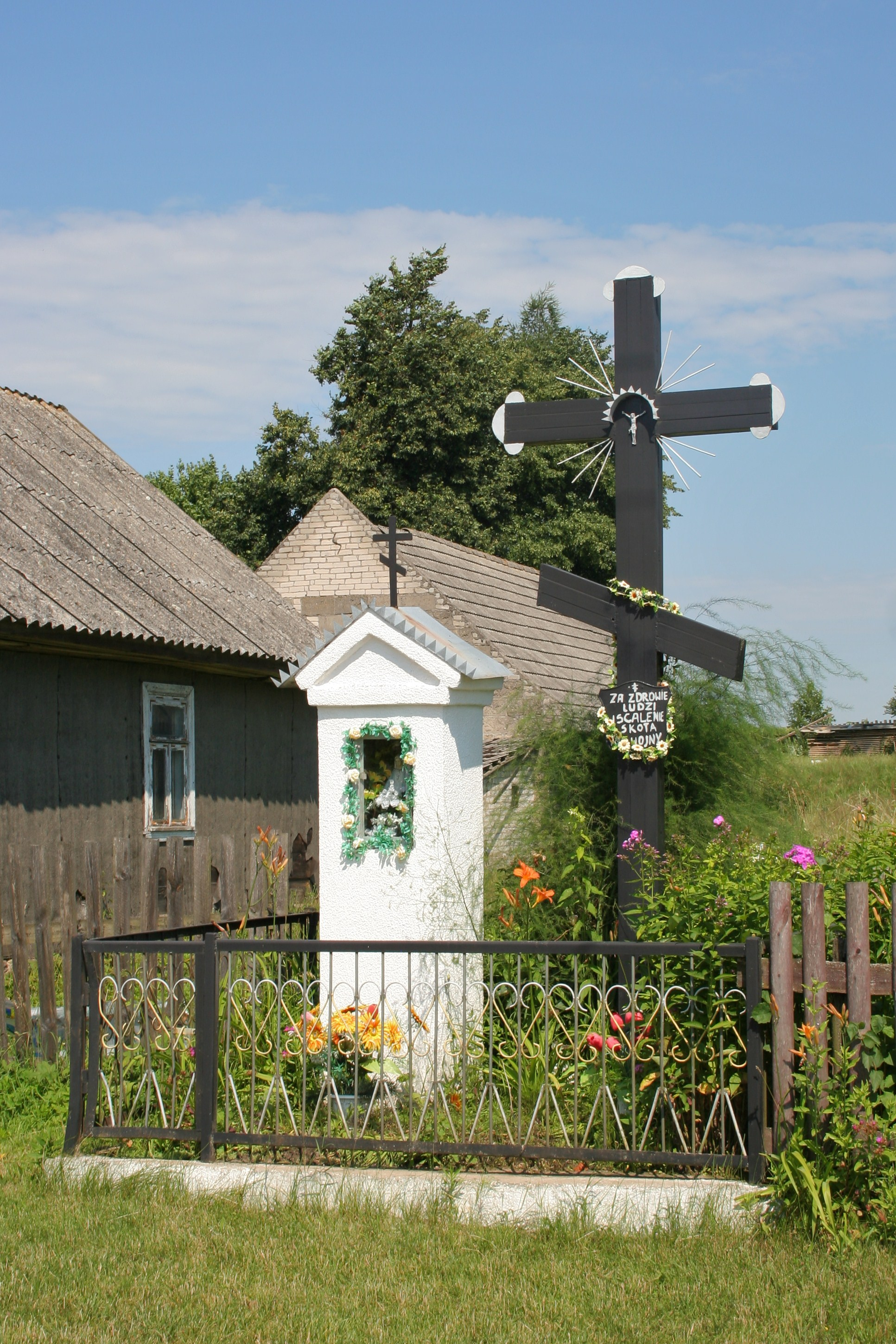 Kapliczka i krzyż przydrożny we wsi Słoja.